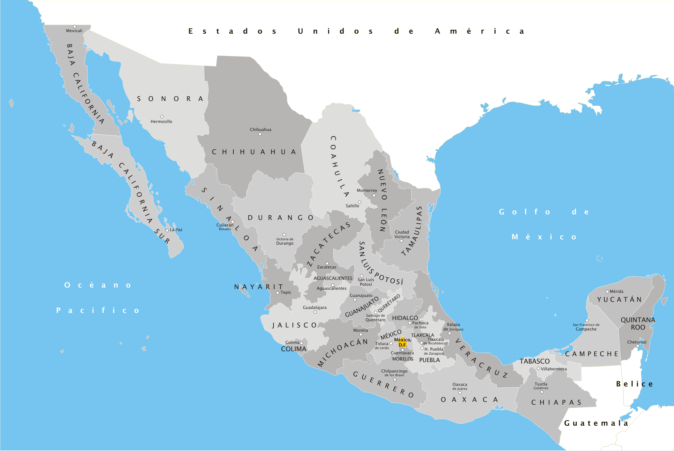 Mapa de México